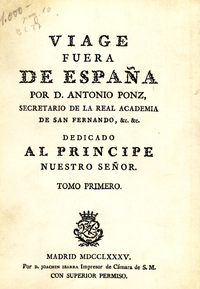 Portada. Antonio Ponz. "Viaje fuera de España". Madrid MDCCLXXXV